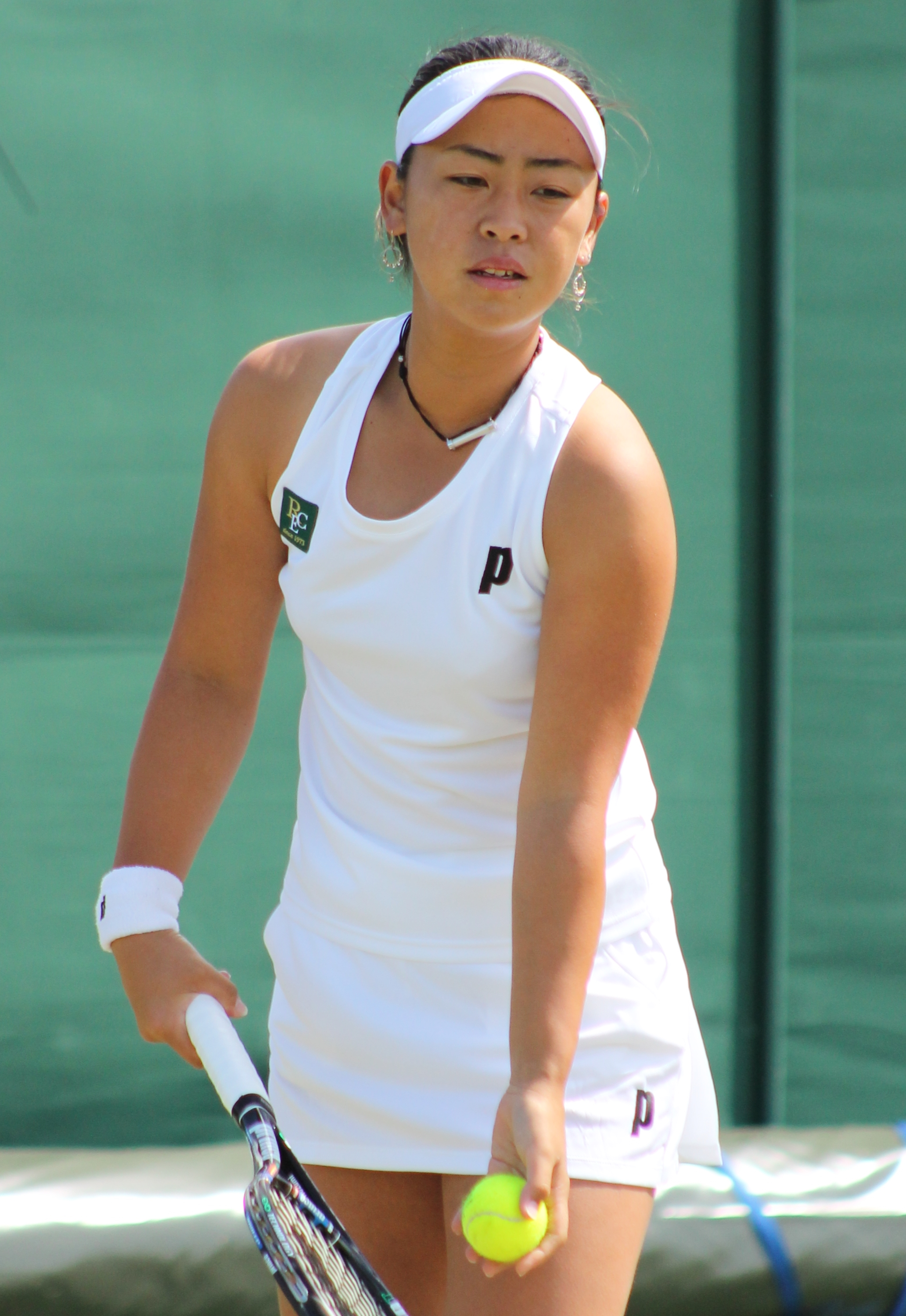 Hozumi WMQ14